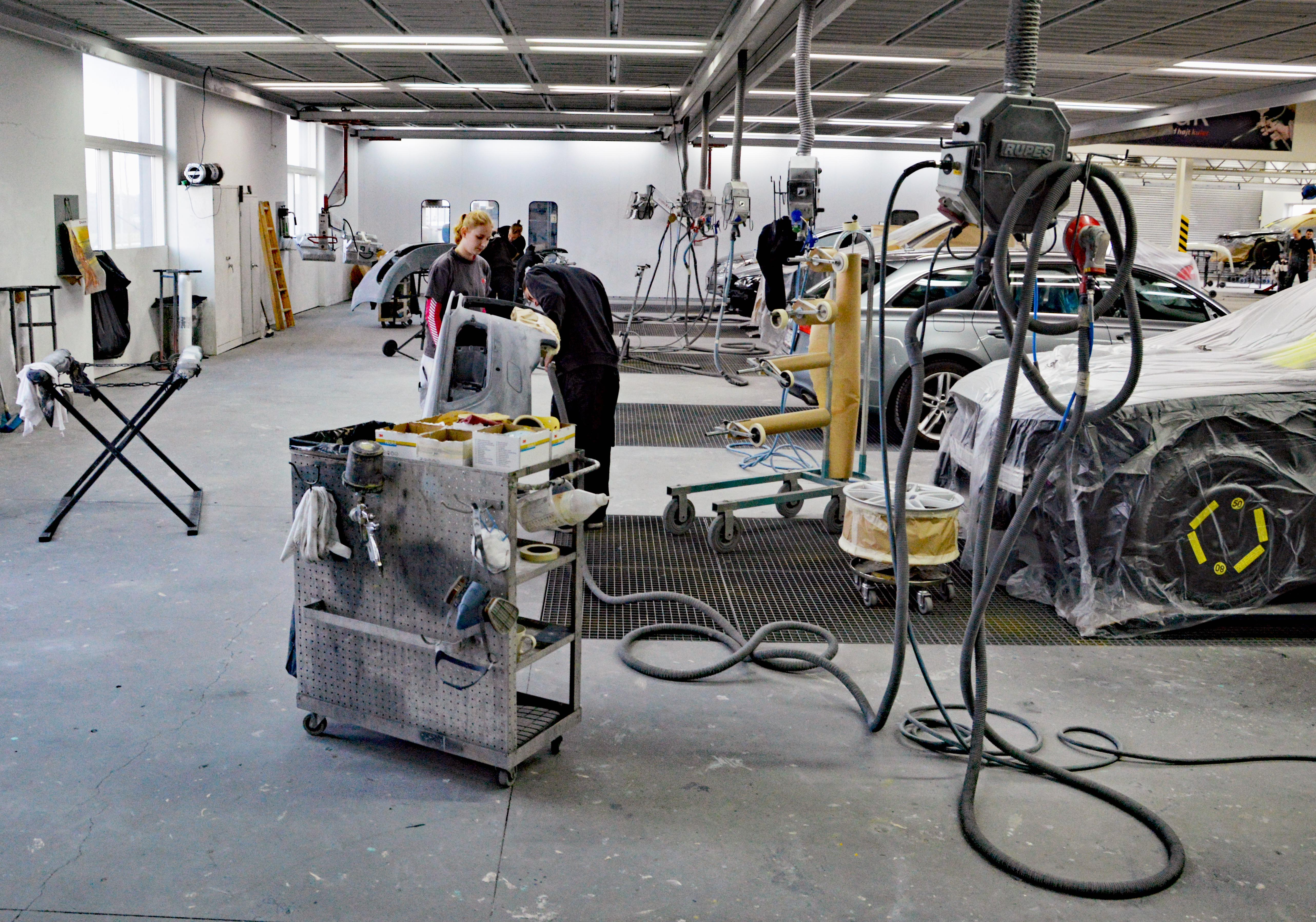 pierre.dk Autolakering A/S blev grundlagt i 1985 og beskæftiger i dag mere end 500 medarbejdere fordelt på over 50 lakcentre i Danmark, Sverige og Tyskland.